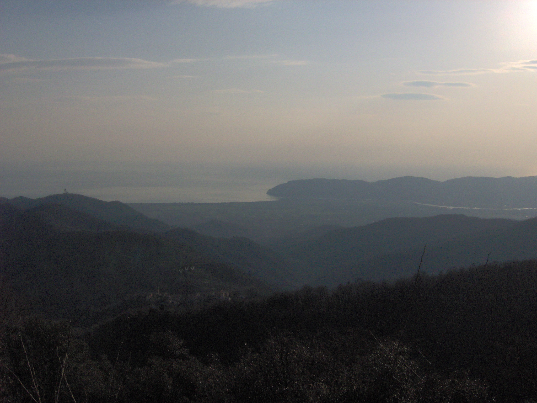 La foce del fiume Magra vista da Campo Cecina